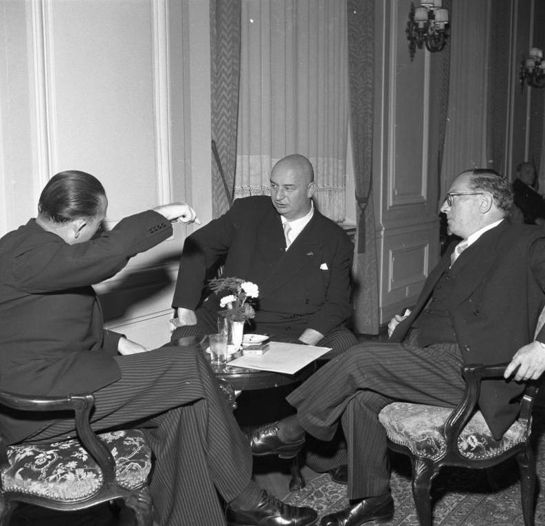 Einweihung des wiederaufgebauten Gürzenich